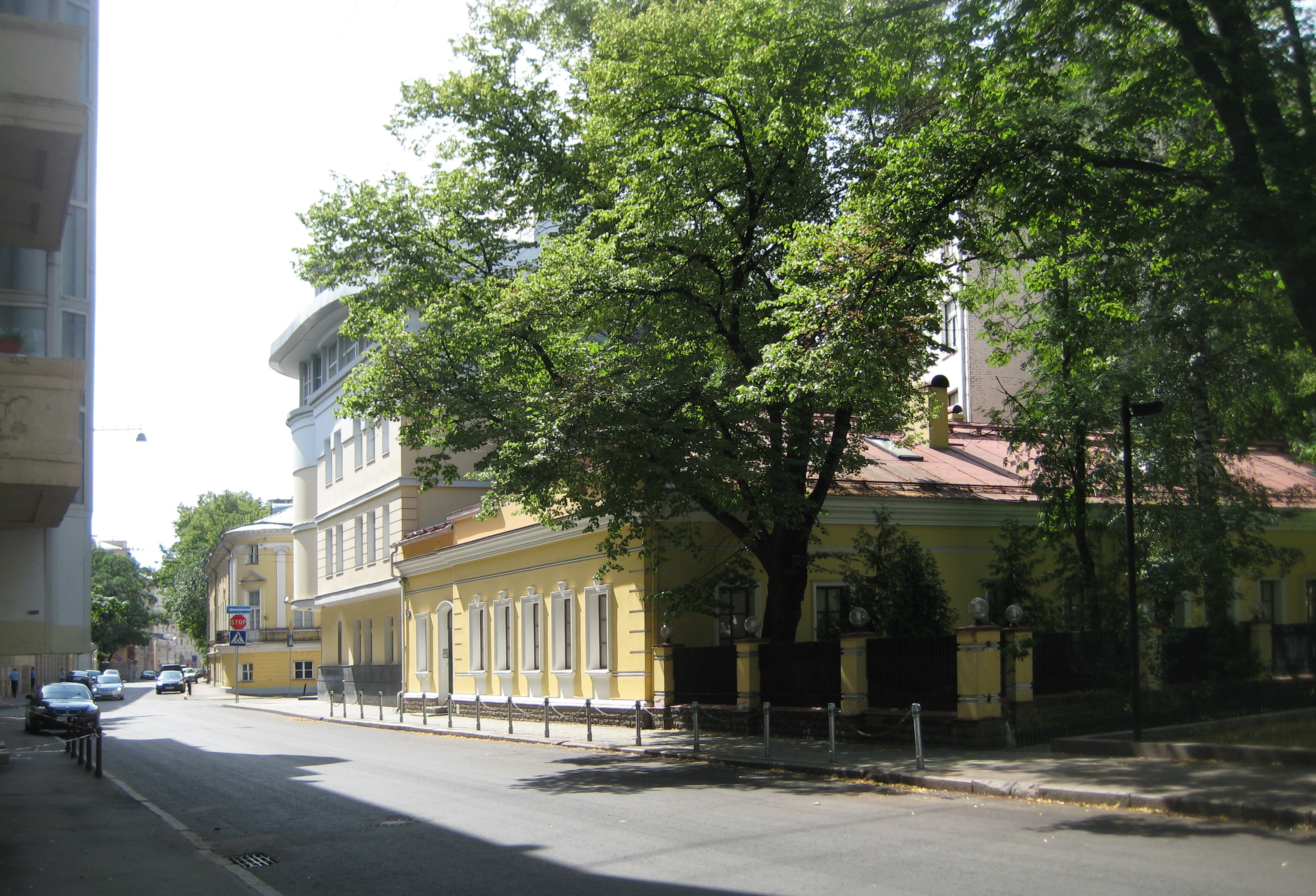 Большой Лёвшинский пер., 6/2 строение 3 Службы городской усадьбы Сабашниковых Построены в 1891 году. Архитектор Ф. Н. Кольбе. В этом доме жил и работал публицист В.Г. Белинский. Объект культурного наследия Городская усадьба, 1-я пол. XIX в Белинский В.Г. (1811-1848) - литературный критик, публицист, революционный демократ. В 1835 г. в этом доме Белинский жил и работал секретарём у литератора А.М. Полторацкого (имеется мемориальная доска).